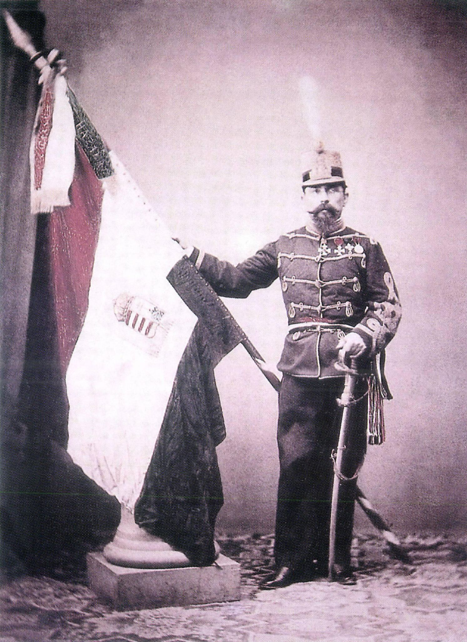 Földváry Károly honvéd ezredes az olaszországi magyar légió zászlajával. Színezett albumin (1863)